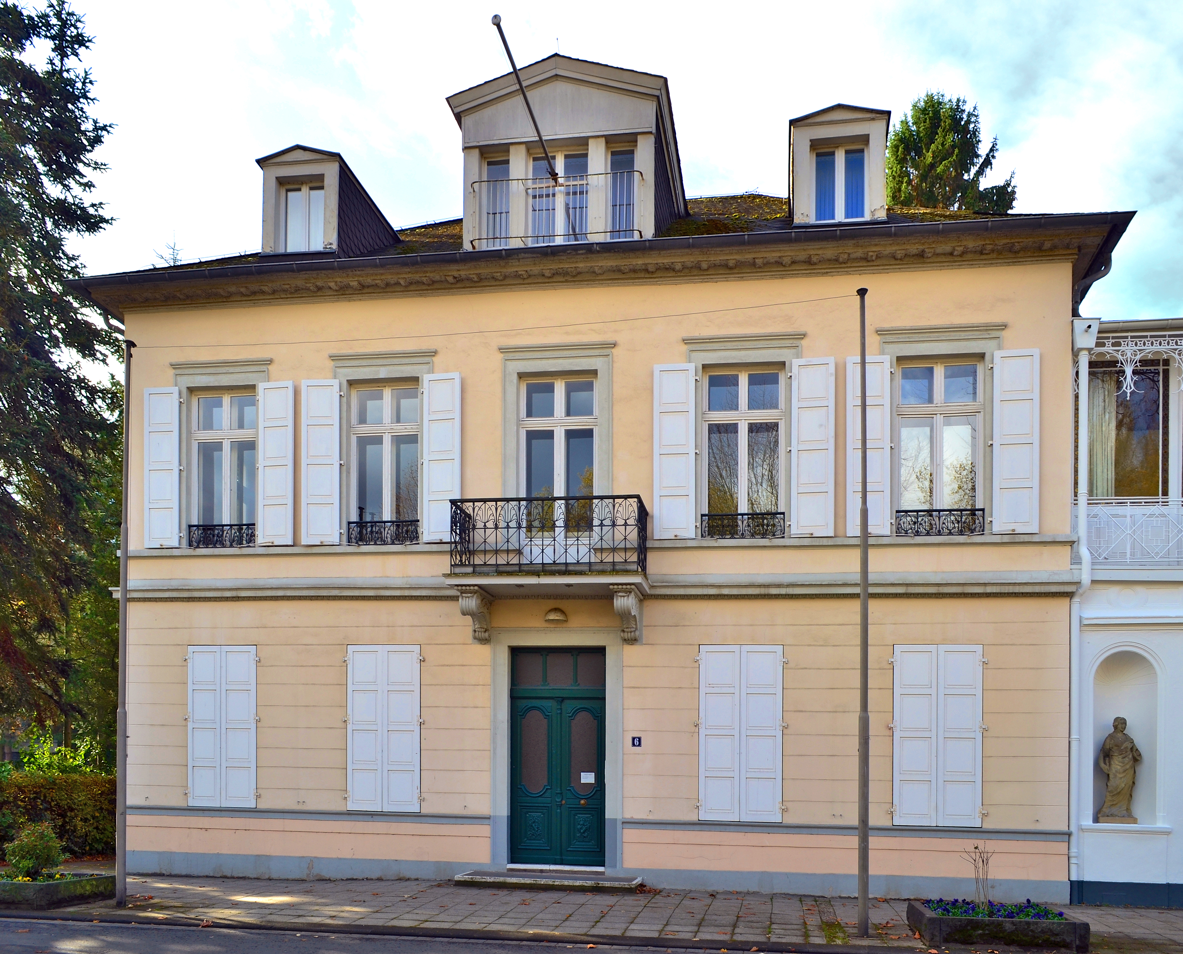 Denkmalgeschützte Villa, Kurfürstenallee 6, Bad Godesberg (Ortsteil Alt-Godesberg)